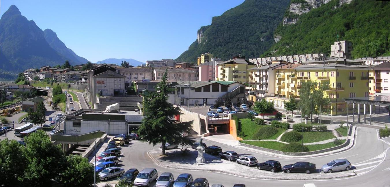 Visuale della città di Longarone (BL)